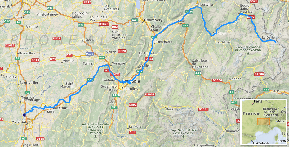 carte réalisée sur umap [1] This map may be incomplete, and may contain errors. Don't rely solely on it for navigation.